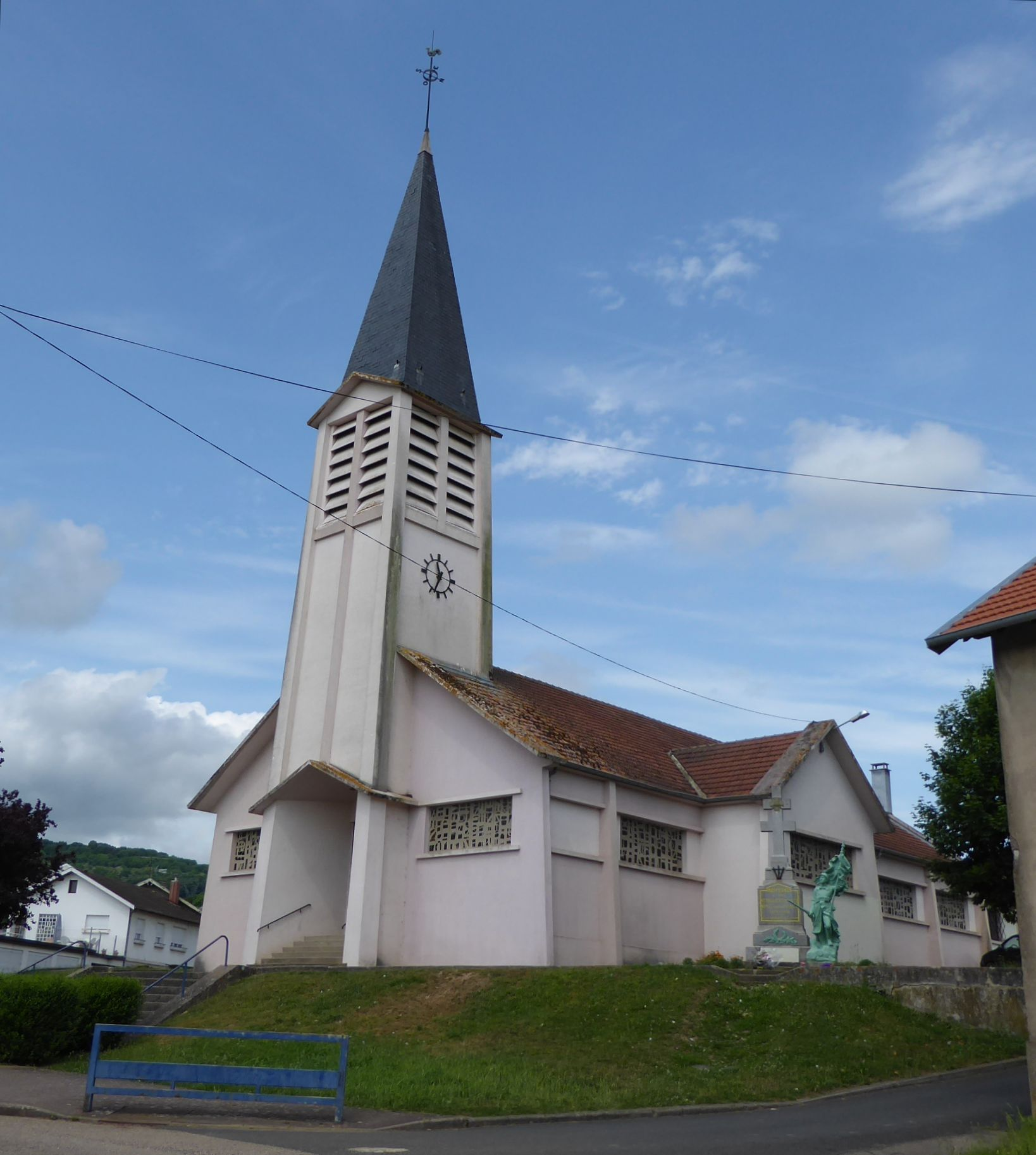 Église de Moivrons en Meurthe-et-Moselle (France).